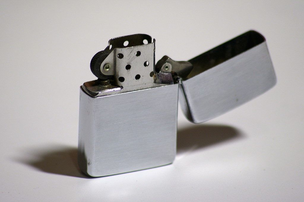 Zippo lighter